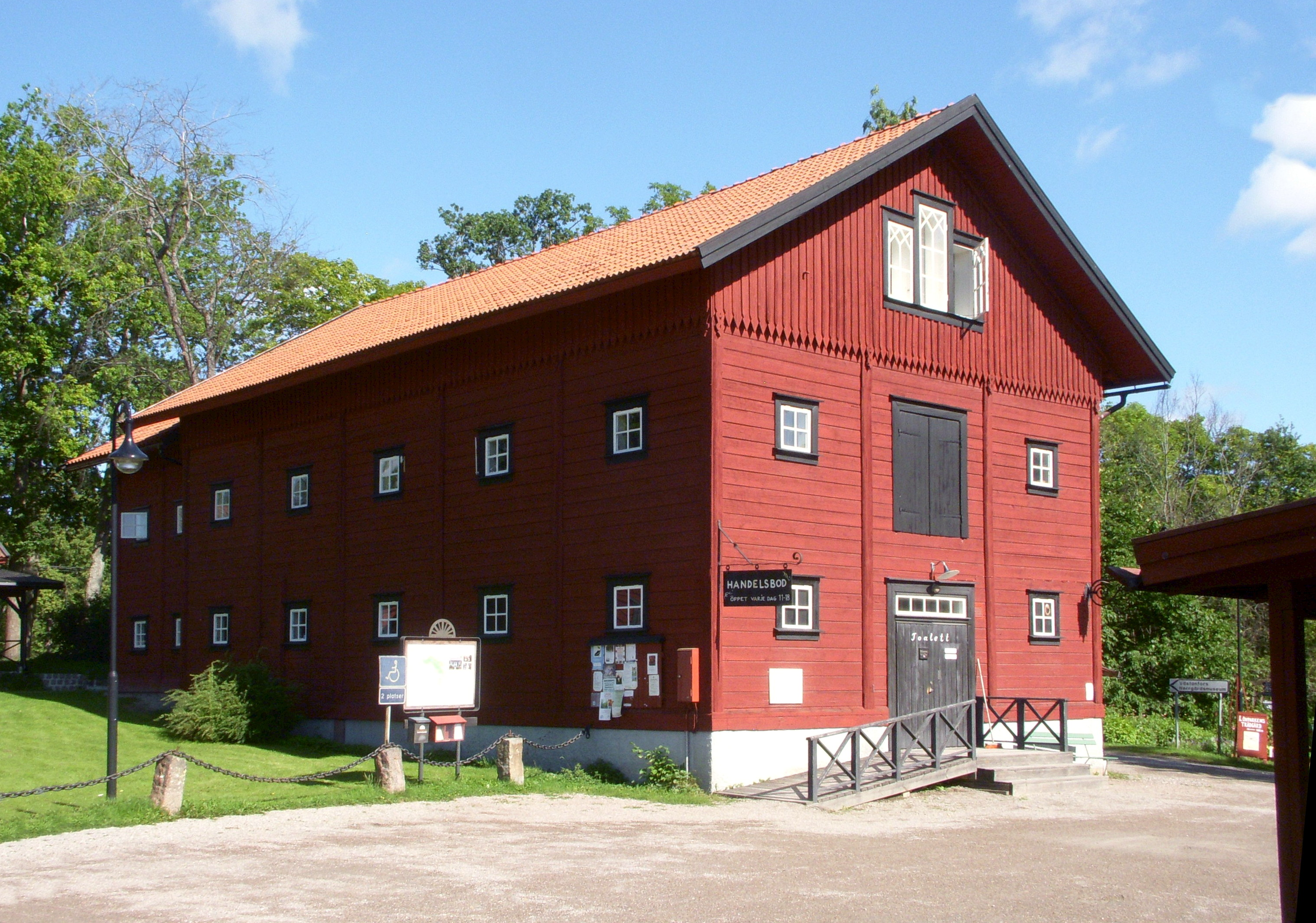 Västanforsområdet